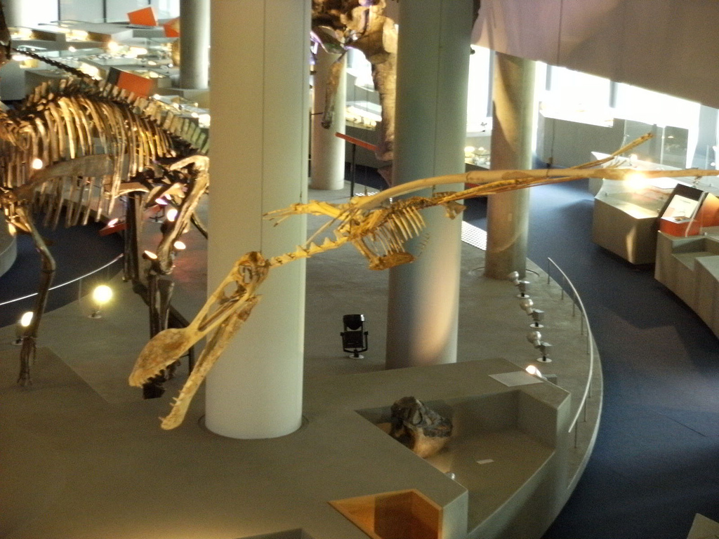 Vliegend reptiel Vliegende hagedis